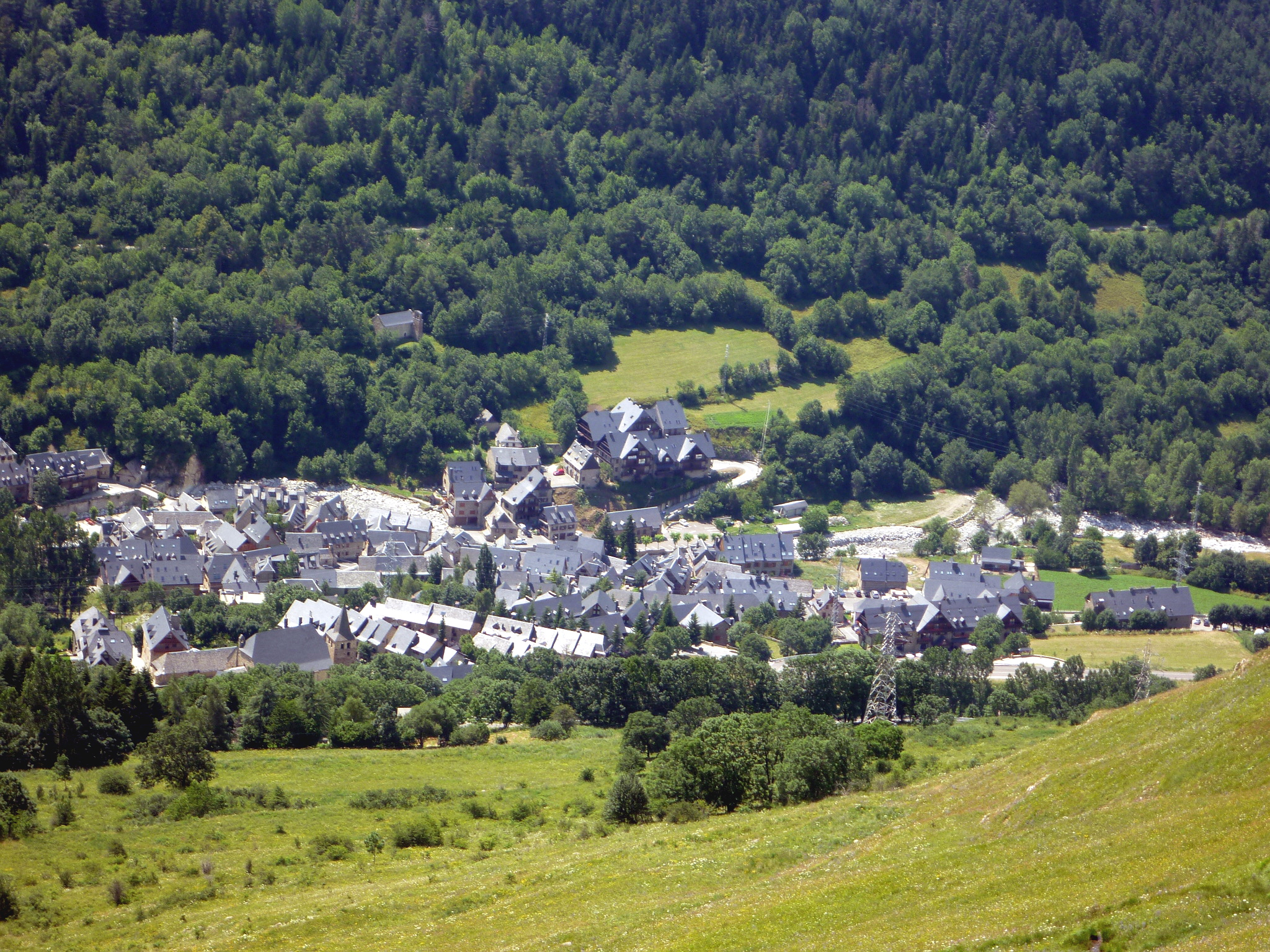 Tredòs (Naut Aran)